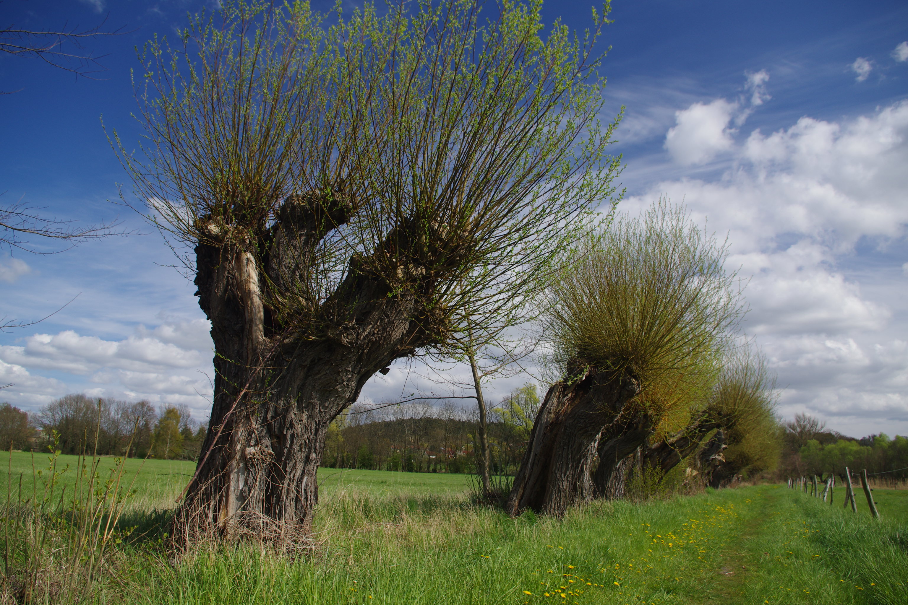 frisch ausgetriebene Kopfweiden stehen an einem fast überwachsenem Wiesenweg, mit erstem Wiesengrün und Butterblumen, LSG Brandenburger Osthavelniederung